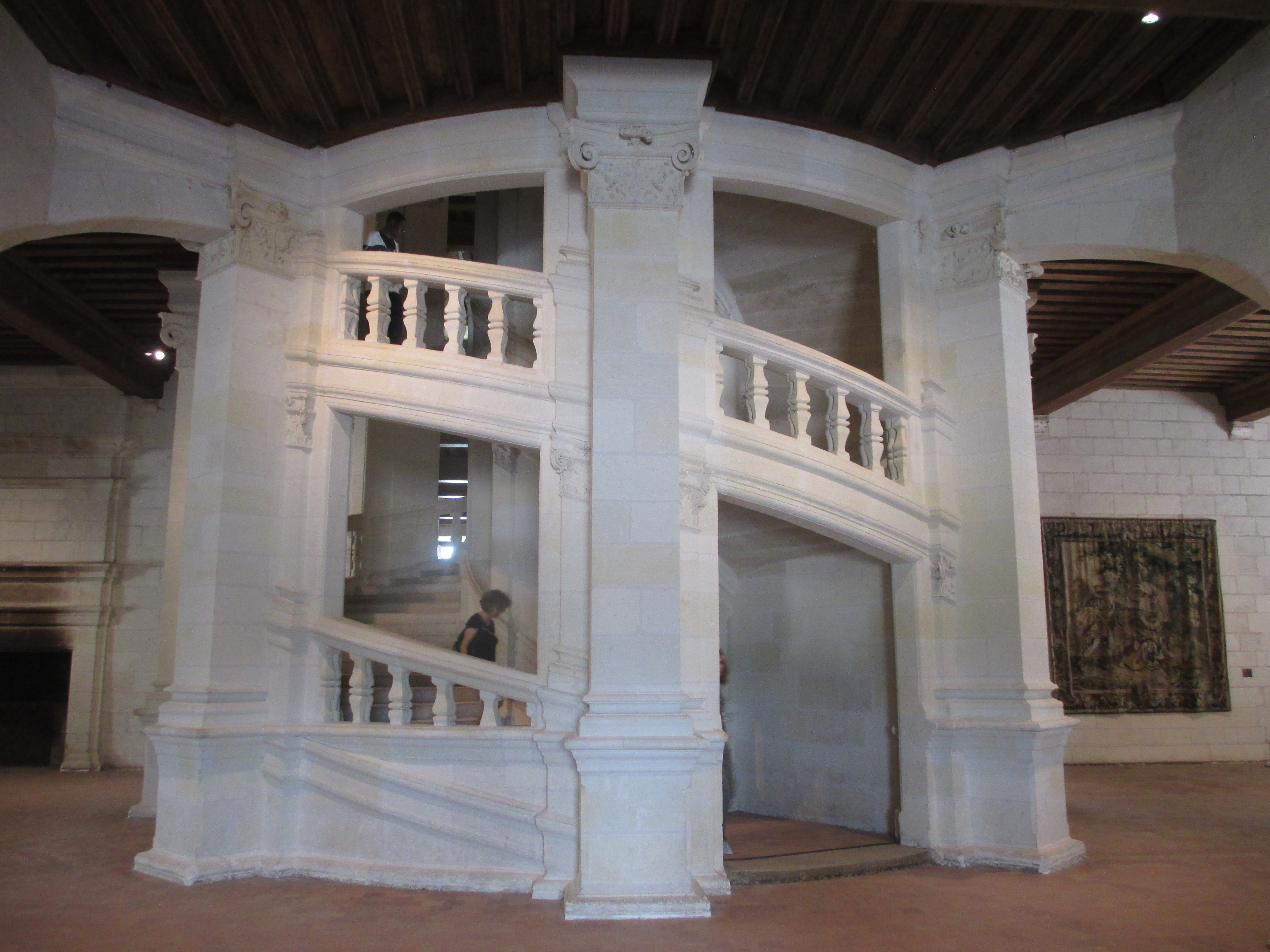 המדרגות הכפולות בטירת שאמבור